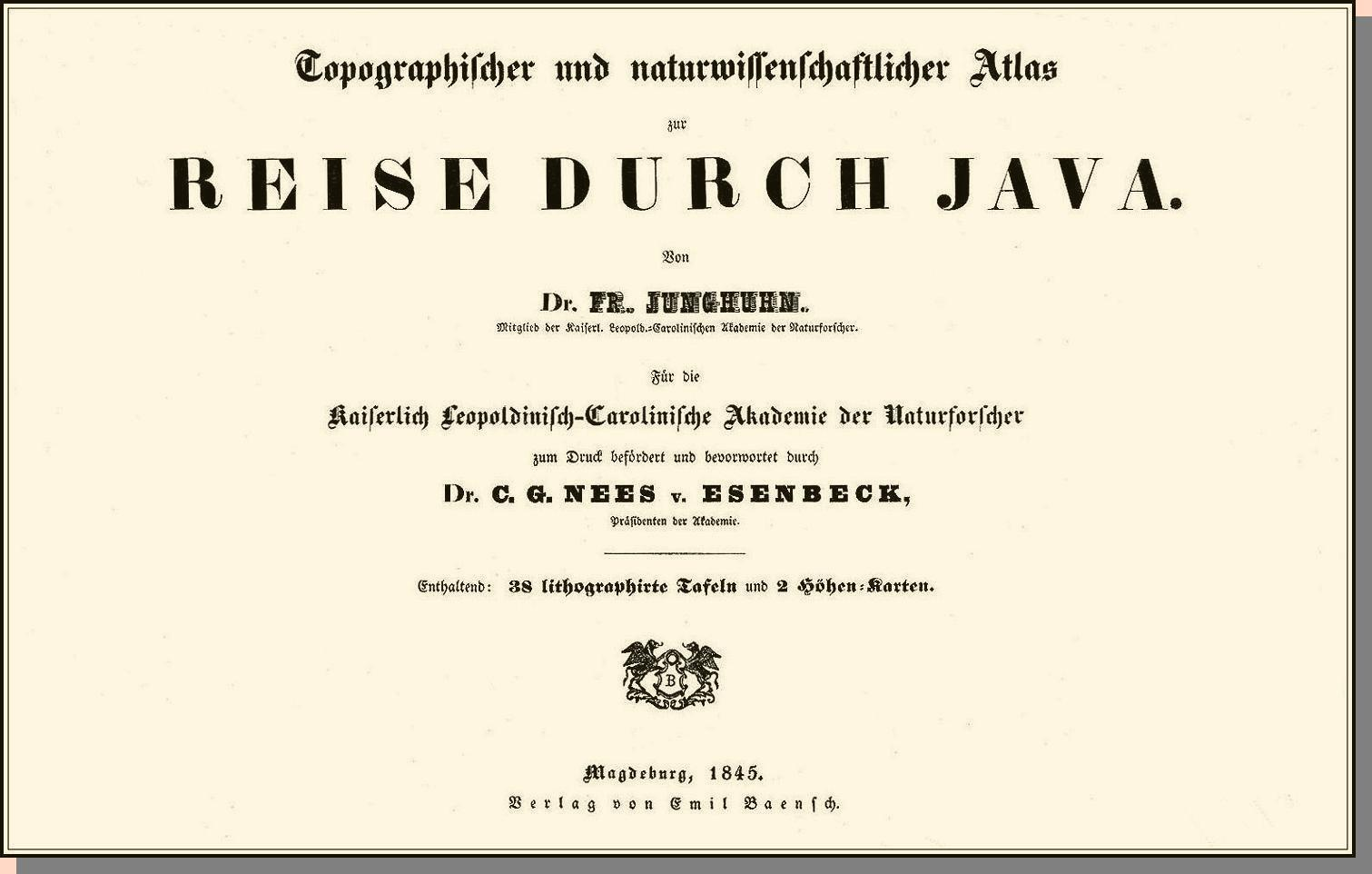 Titelblatt des Atlas